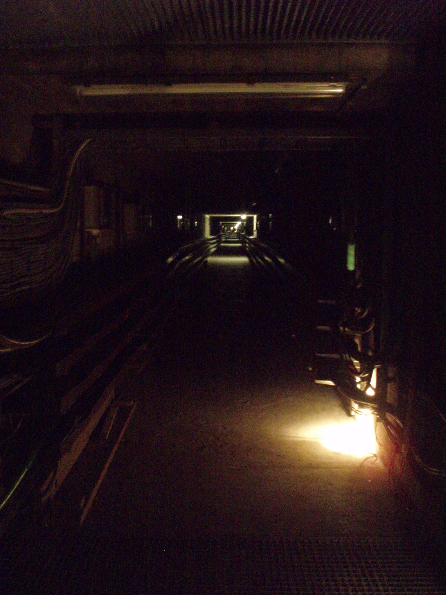 Emergency exit IJ-tunnel, Amsterdam, Netherlands